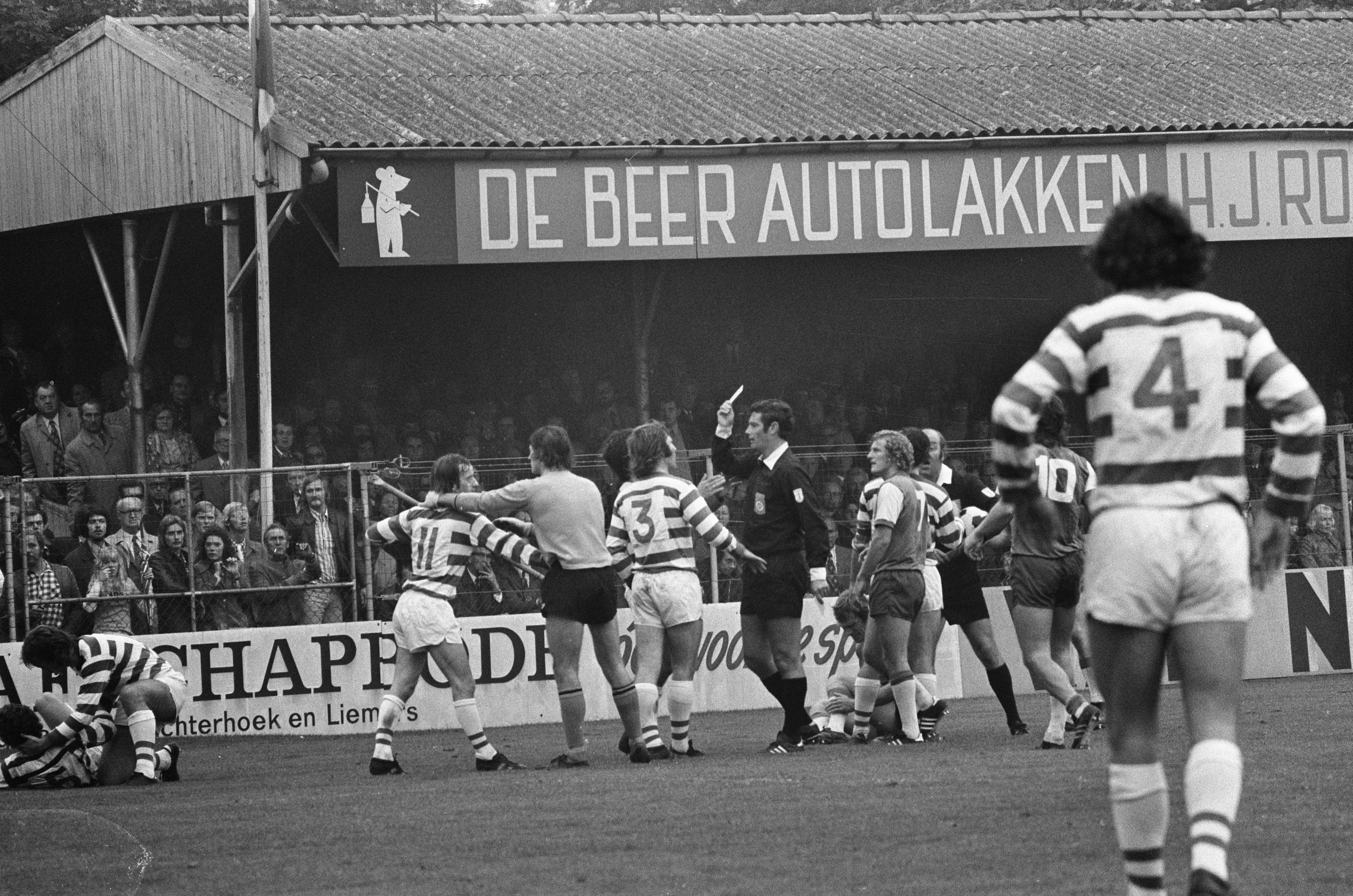 Collectie / Archief : Fotocollectie Anefo Reportage / Serie : [ onbekend ] Beschrijving : De Graafschap tegen Feyenoord 5-7, scheidsrechter Corver geeft gele kaart Datum : 7 oktober 1973 Trefwoorden : scheidsrechters, sport, voetbal Instellingsnaam : Feyenoord, Graafschap, De Fotograaf : Mieremet, Rob / Anefo Auteursrechthebbende : Nationaal Archief Materiaalsoort : Negatief (zwart/wit) Nummer archiefinventaris : bekijk toegang 2.24.01.05 Bestanddeelnummer : 926-7339